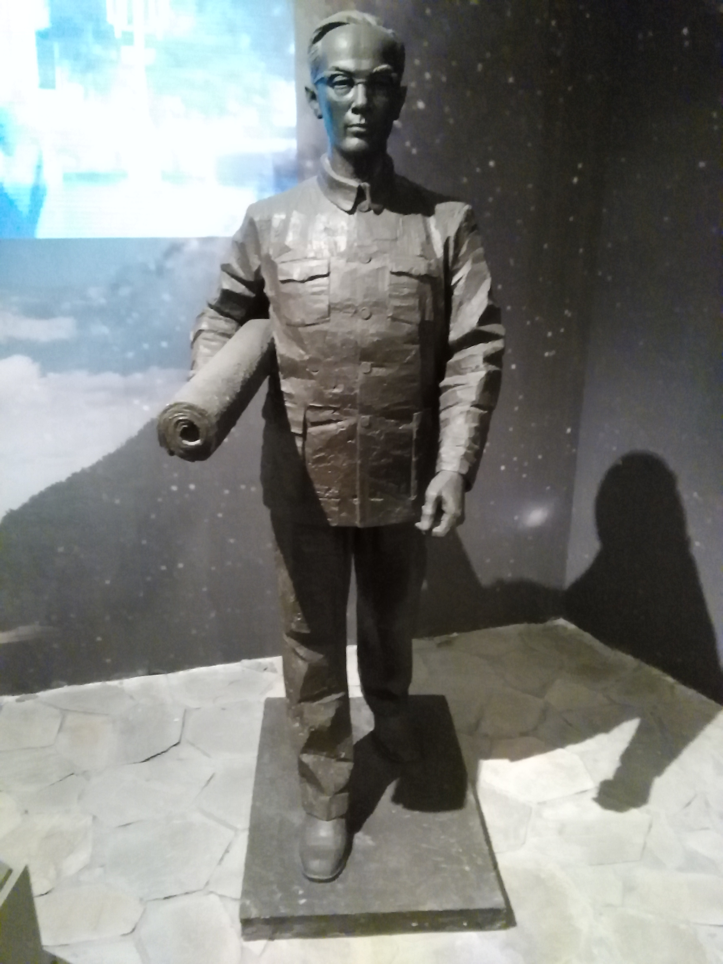 姚桐斌塑像，无锡博物院